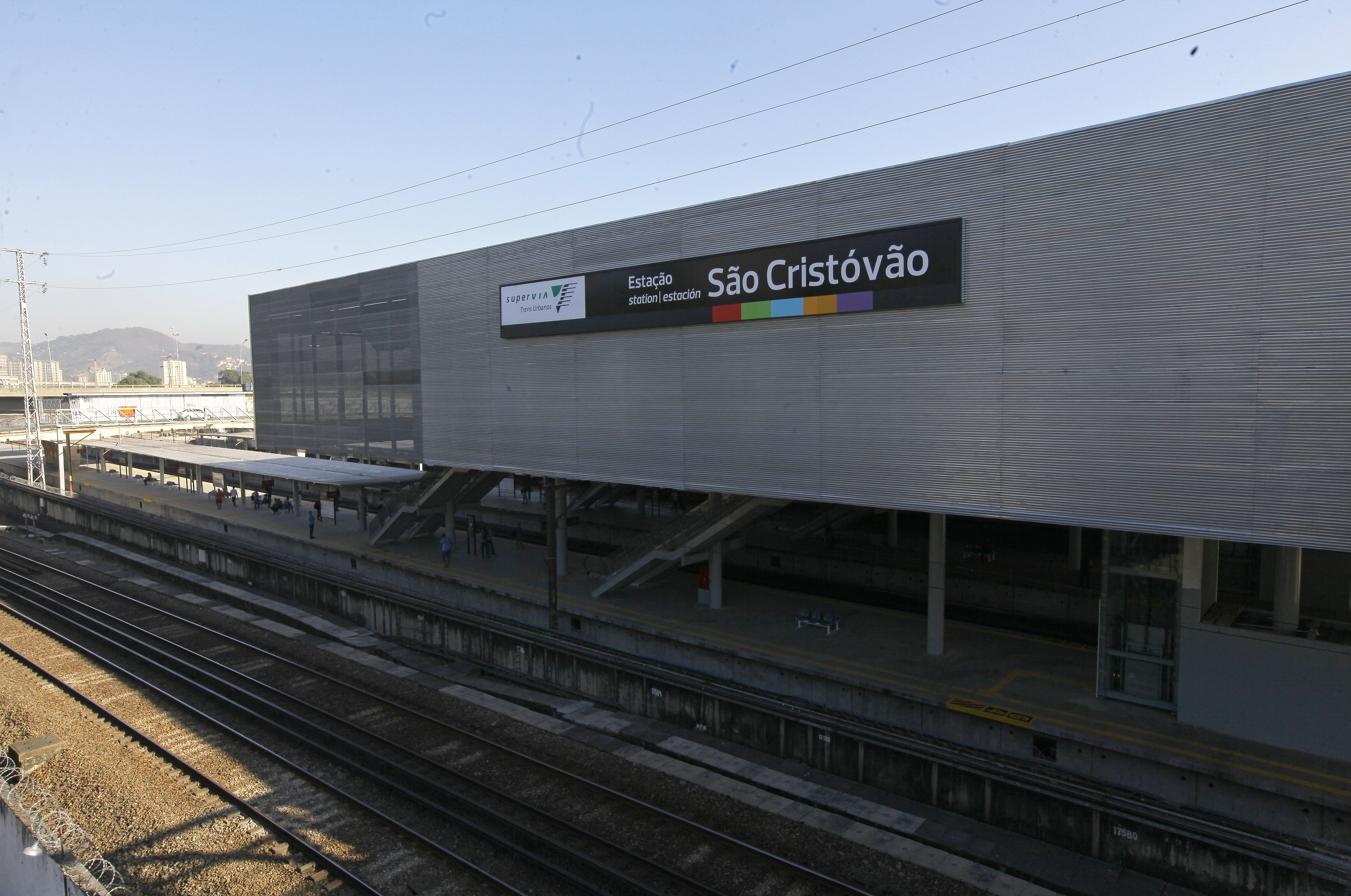 Estação Olímpica de São Cristóvão, depois da reforma para as olimpíadas do Rio de Janeiro.